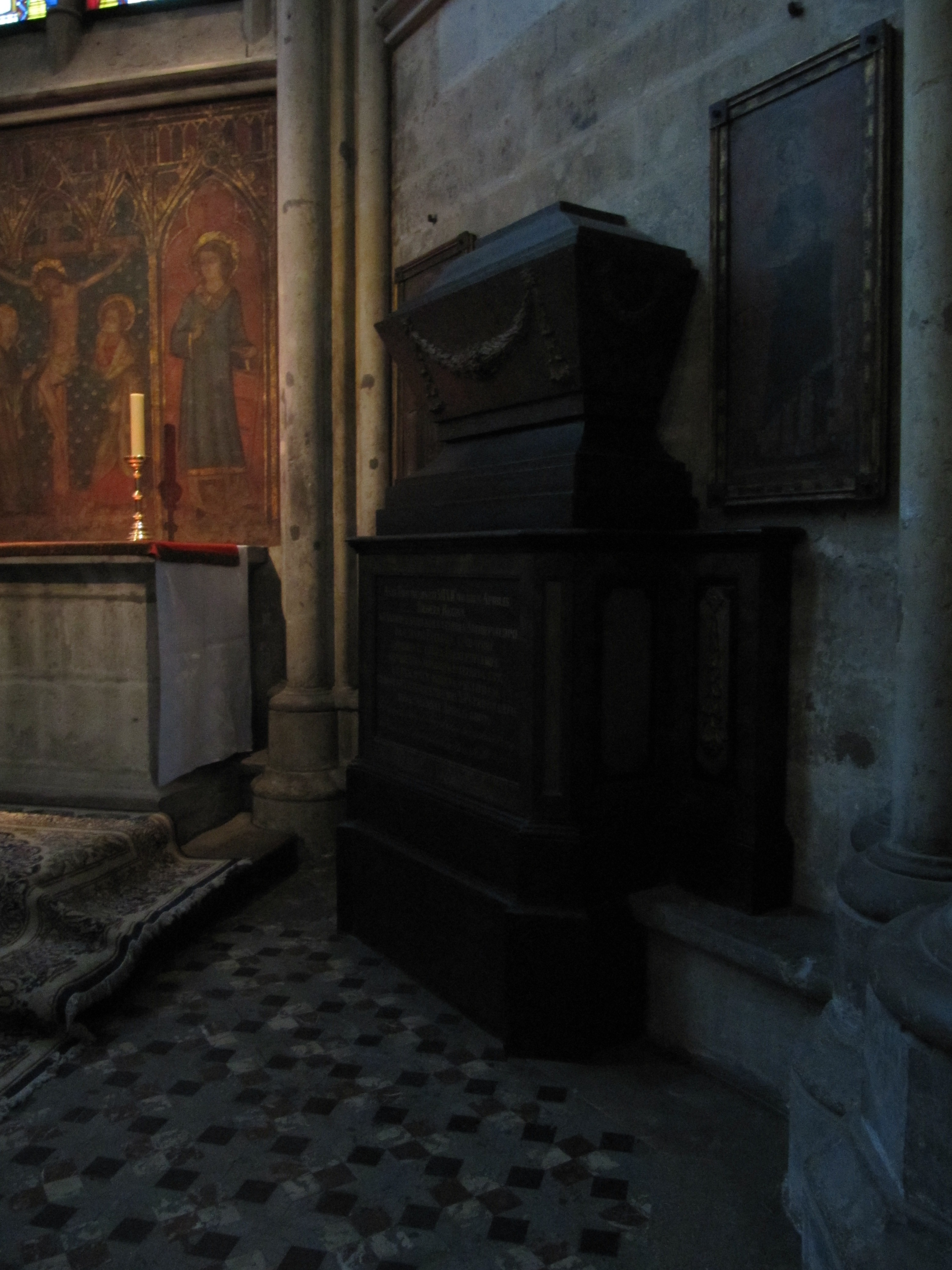 Усыпальница Рыксы Лотарингской в Кёльнском соборе